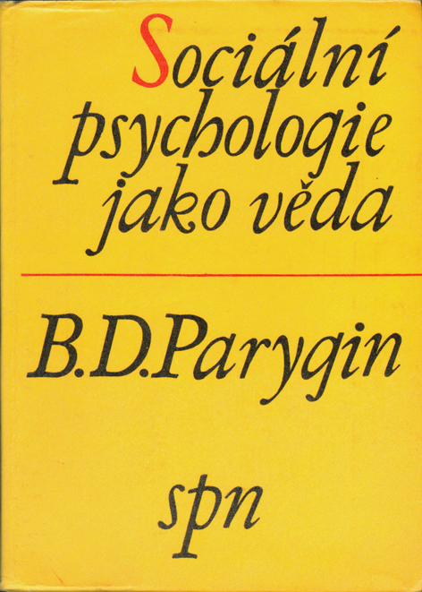 Обложка книги Б. Д. Парыгин "Социальная психология как наука". 1968. Чешское издание. Монография на чешском яз. Praha, 192 стр, 21 х 15 см, тир. 6000 экз.